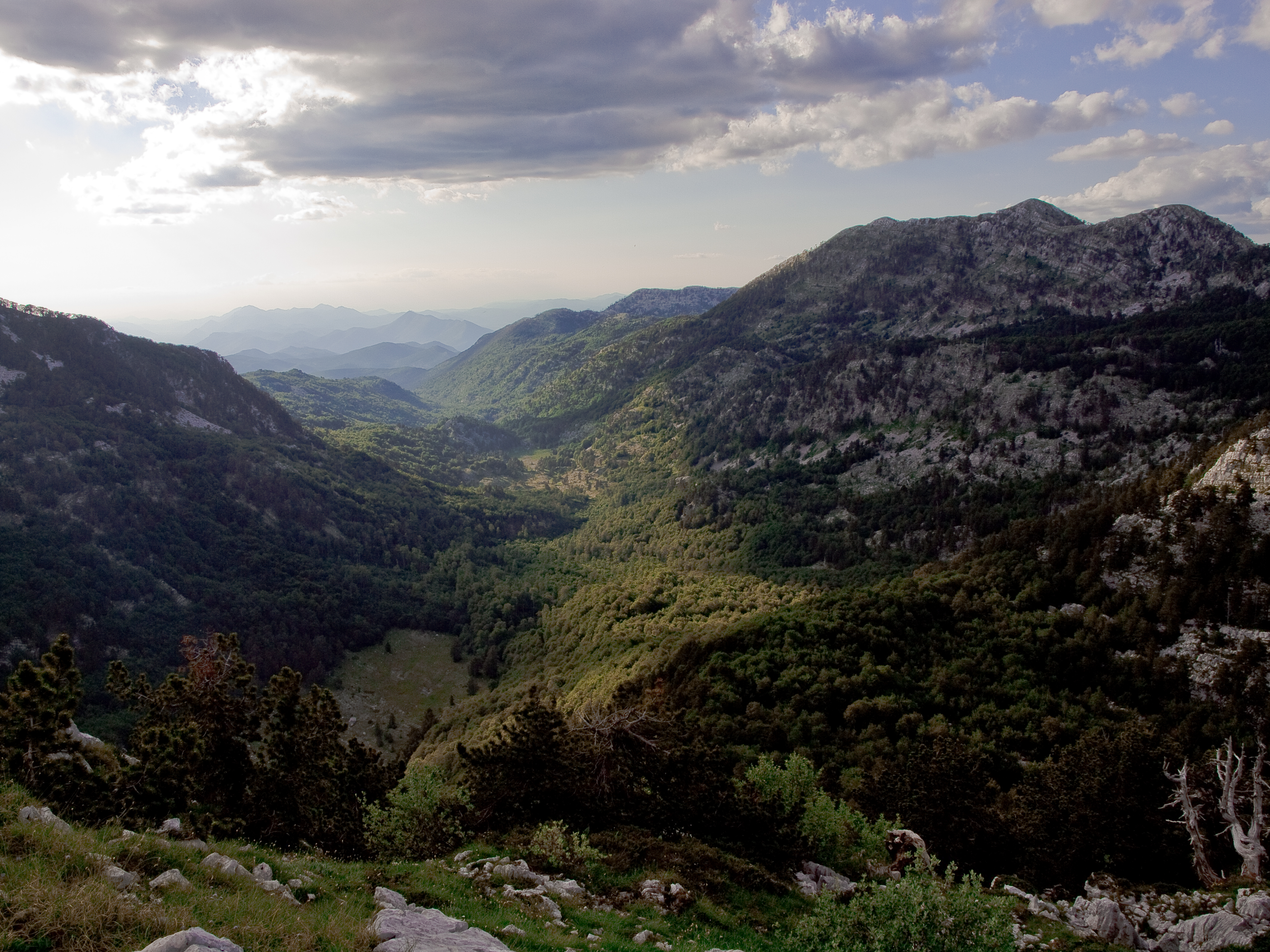 Die Velika Jastrebica über dem Trogtal von Pirina poljana, an der Grenze zwischen Montenegro und Bosnien-herzegowina. (Original text: 15.09.1999 im Orjen aufgenommen)